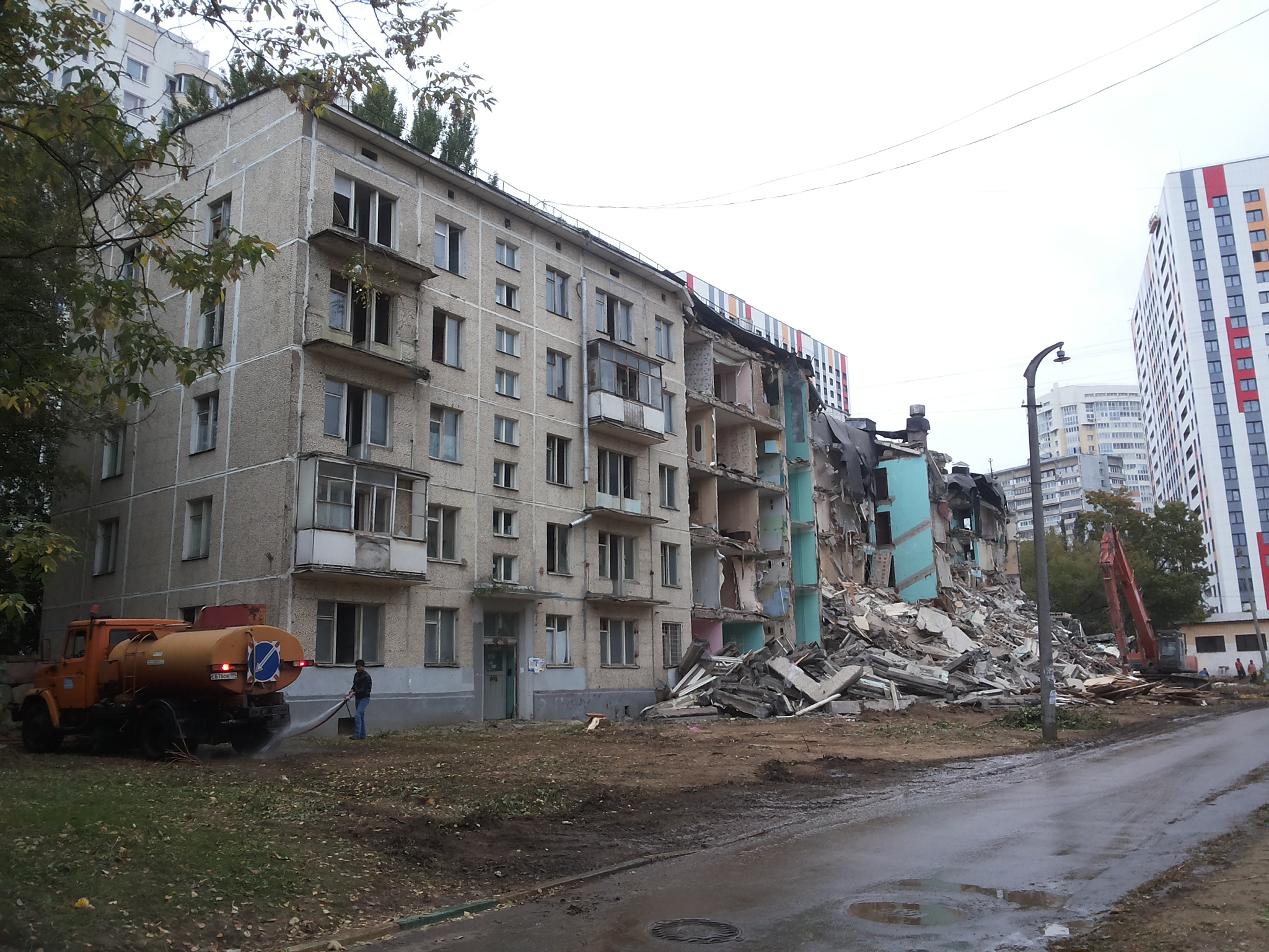 Снос дома серии 1-515/5 в Кунцево